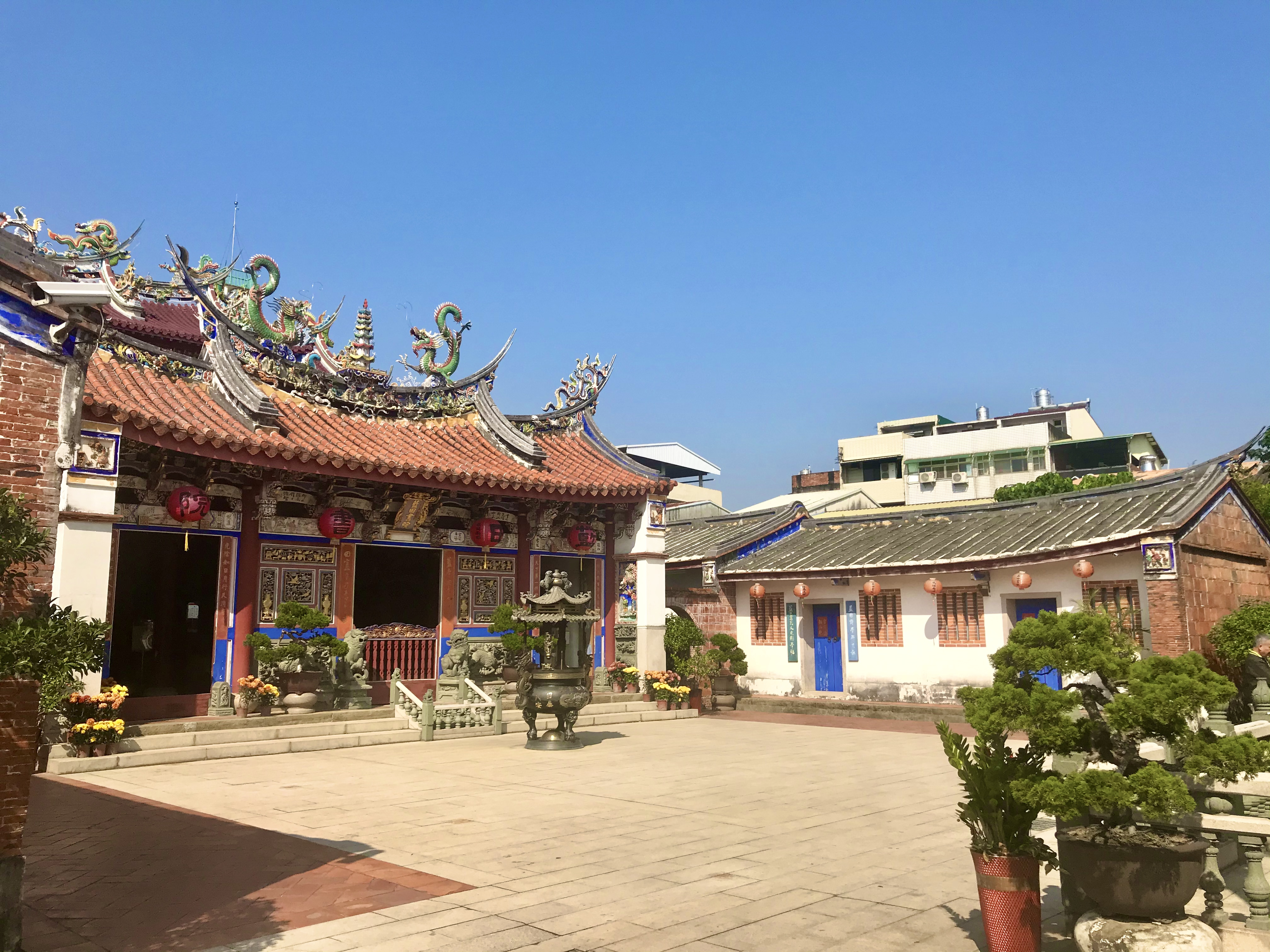 藍田書院斜照